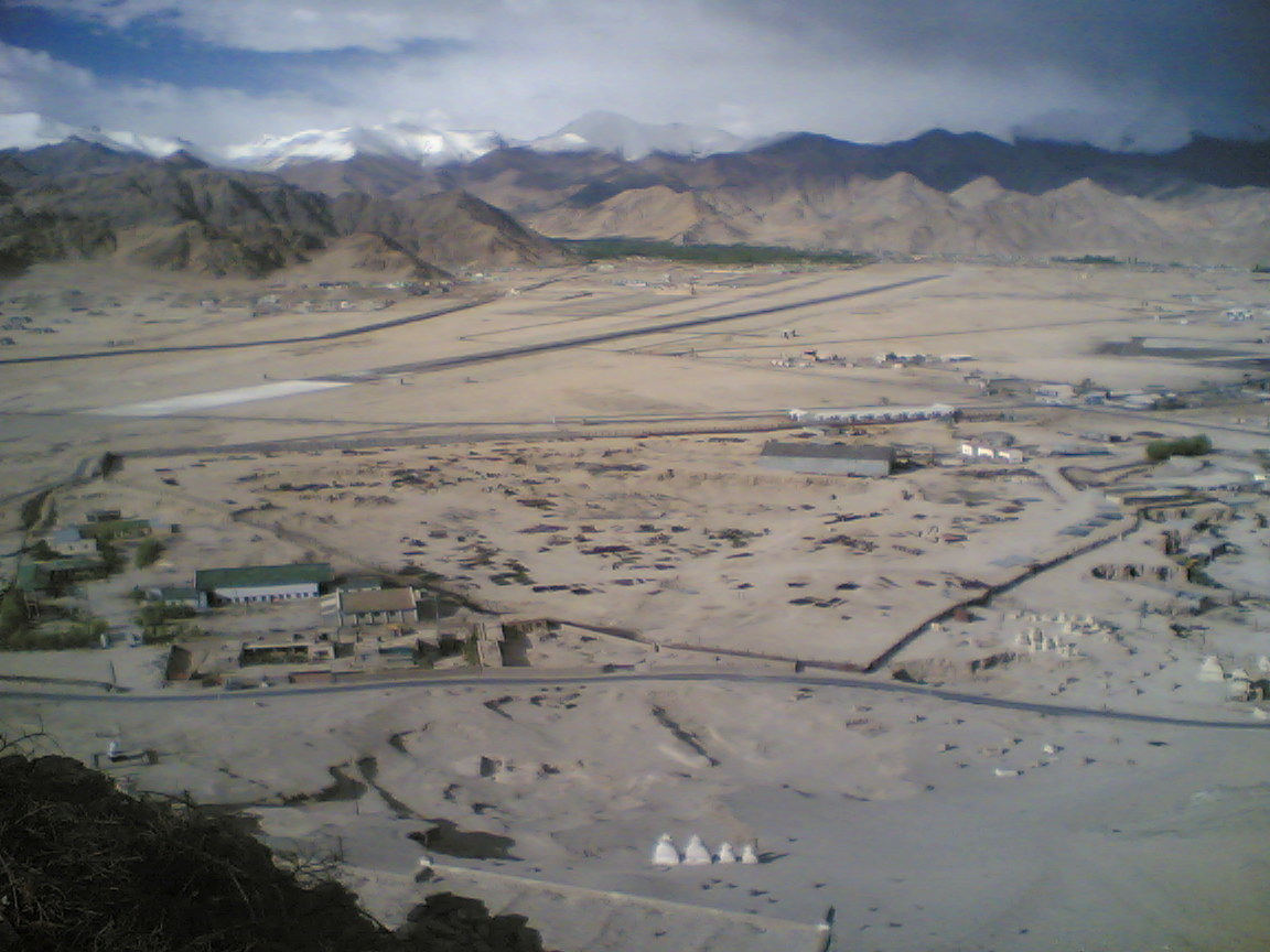 Leh Airport, Ladakh. Jiten Mehra